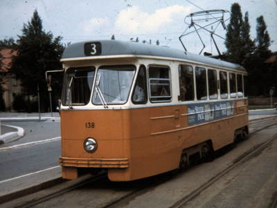 Från 1973